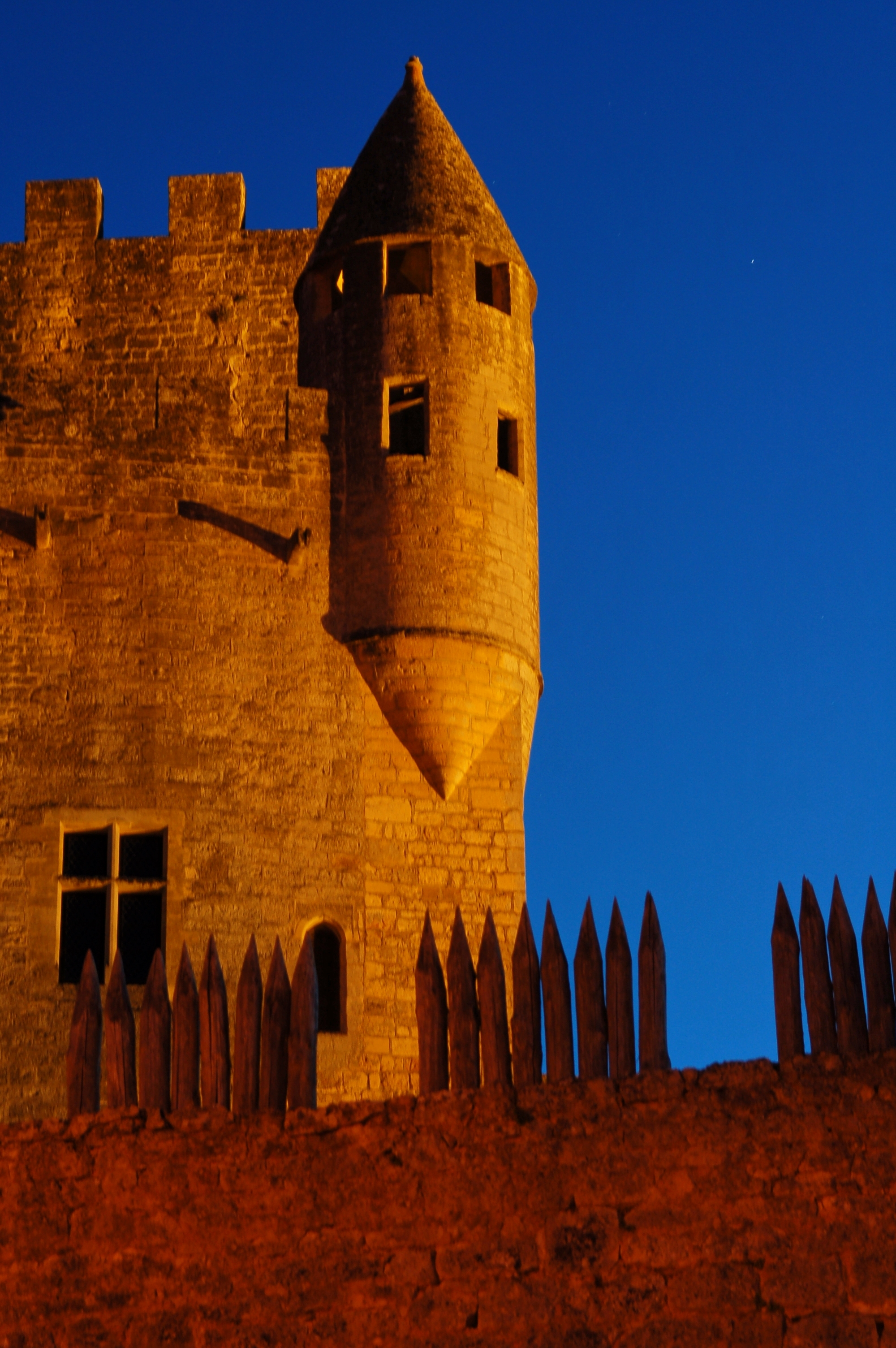 Château de Beynac (Périgord - Dordogne - France), vue de nuit